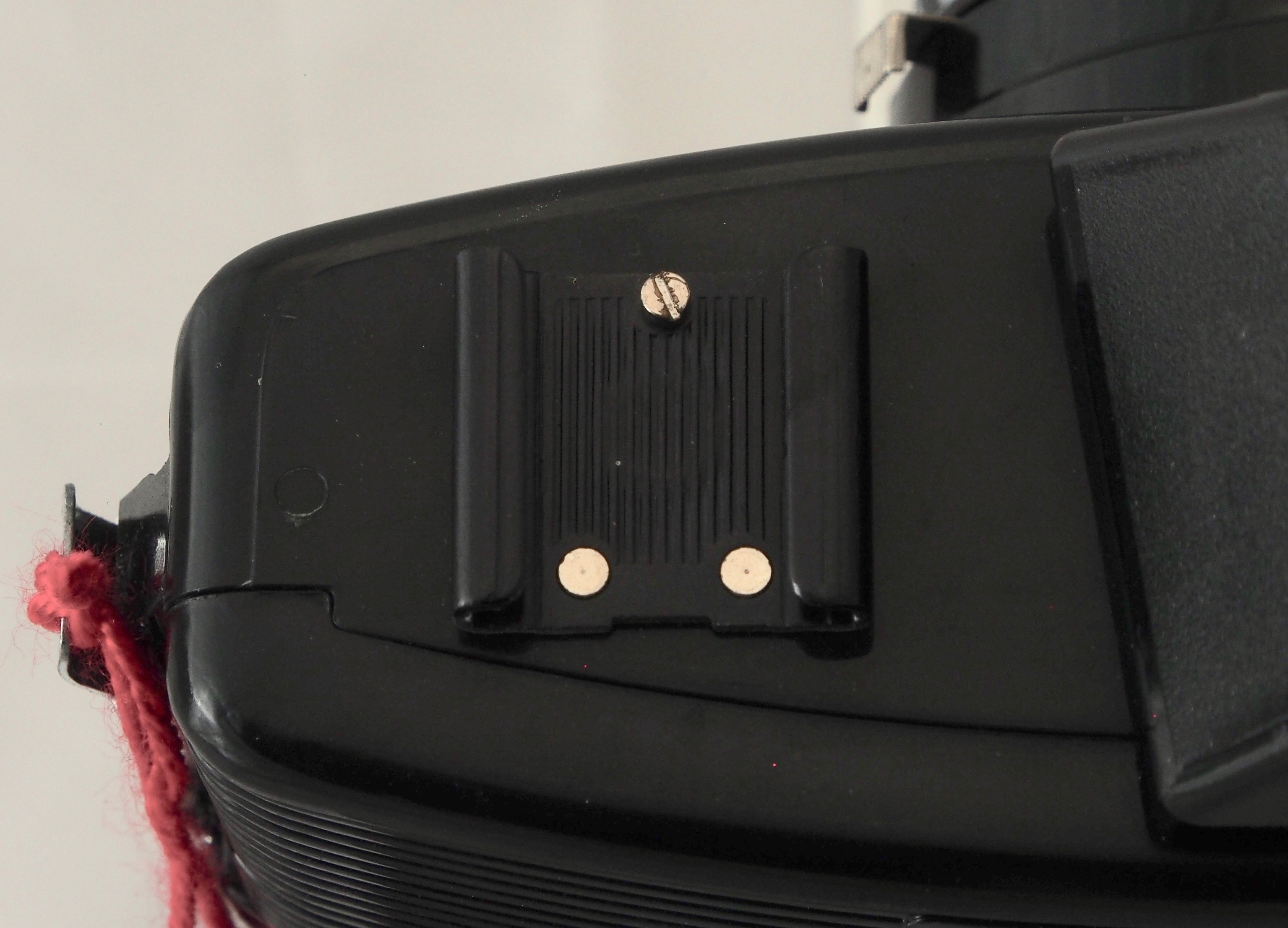 Click Blitzschuh bei der Click IV